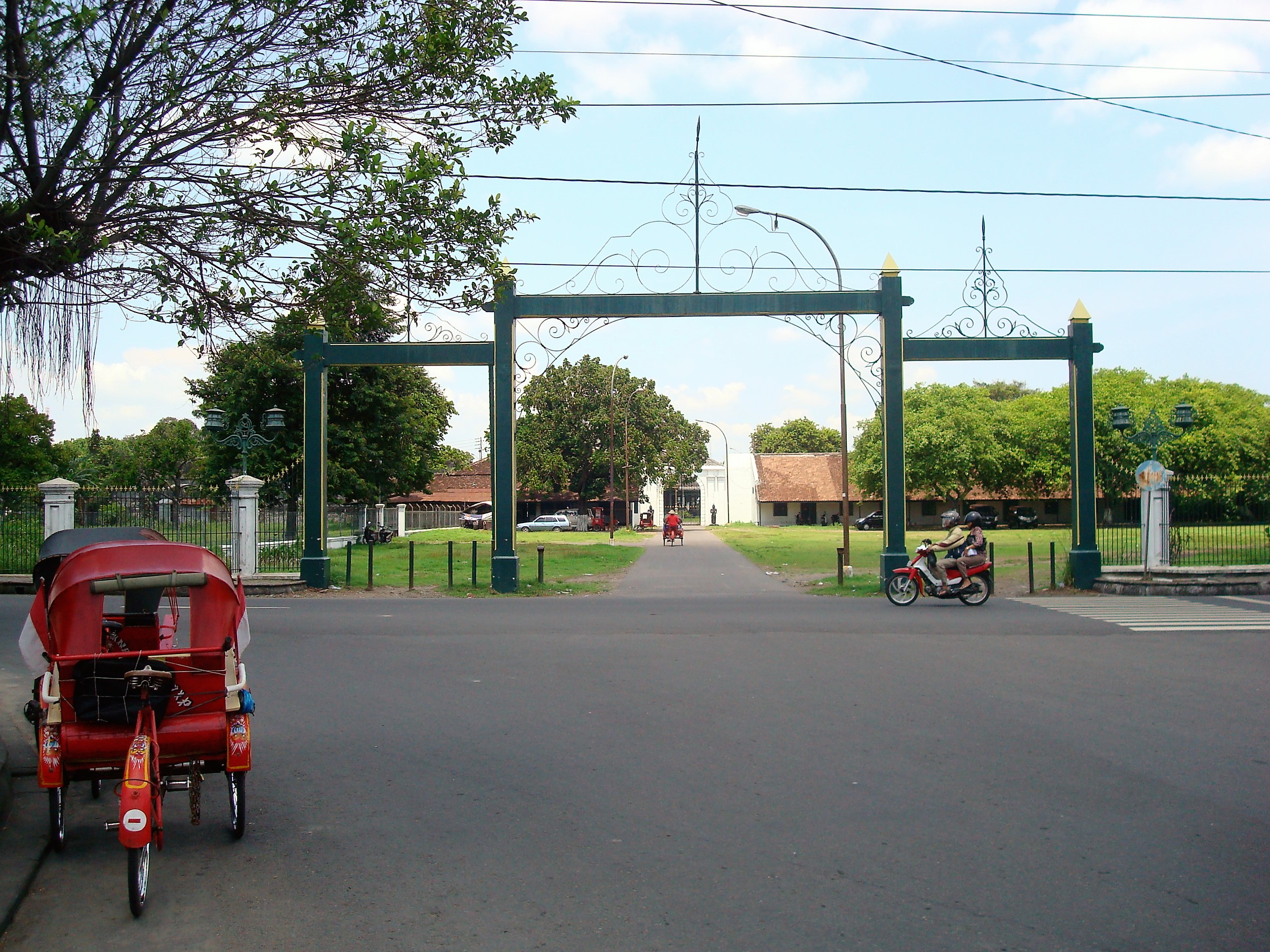 Eingang zum Mangkunegaran Palace